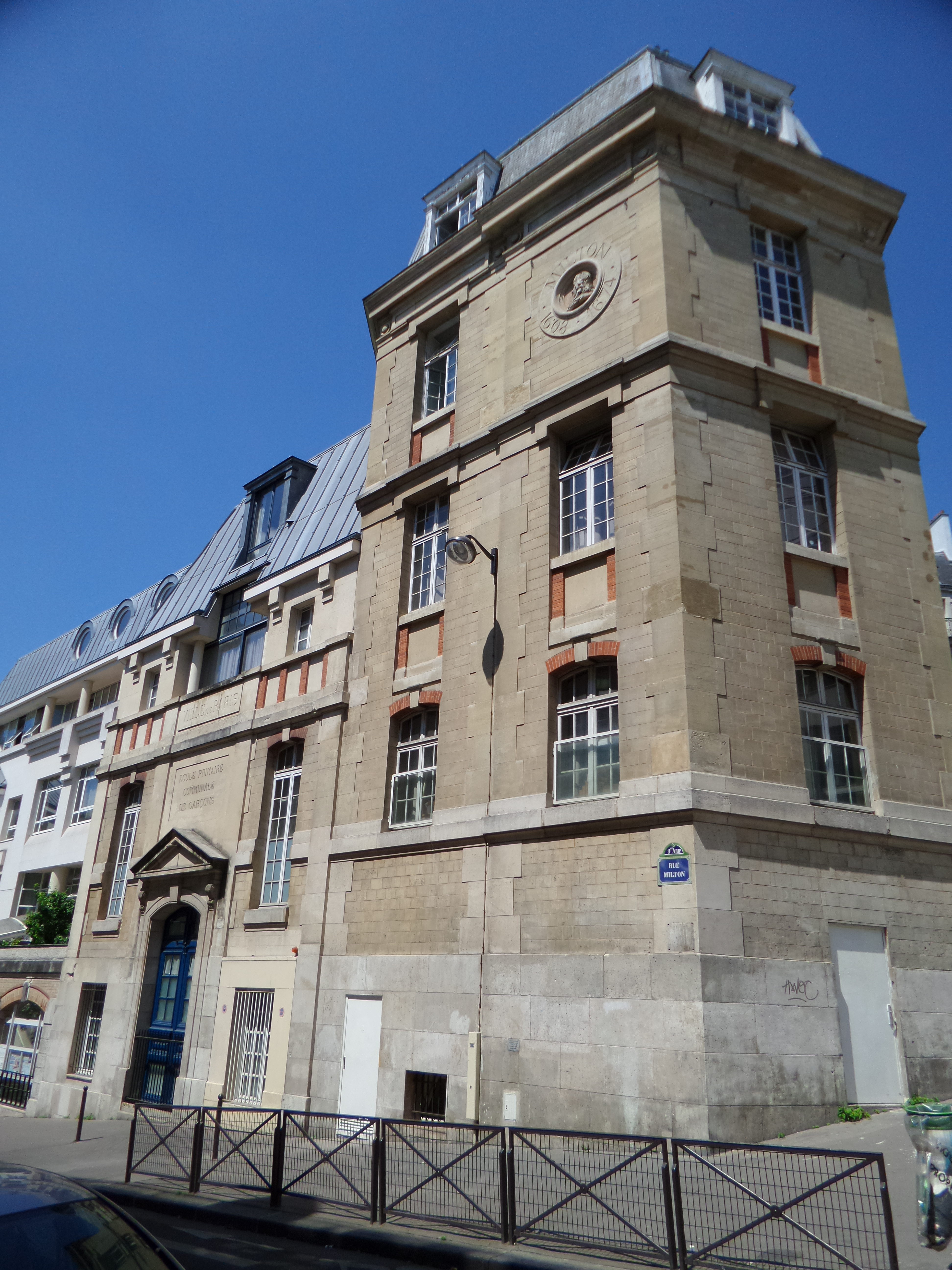 École primaire de la rue Milton à Paris